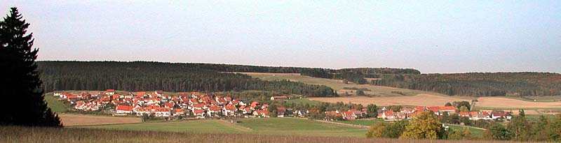 Stedten an der Ilm, Blick auf den Ort; Panorama-Ansicht von Süden, links Neu-Stedten, rechts Alt-Stedten, dahinter der Reinhardtsberg